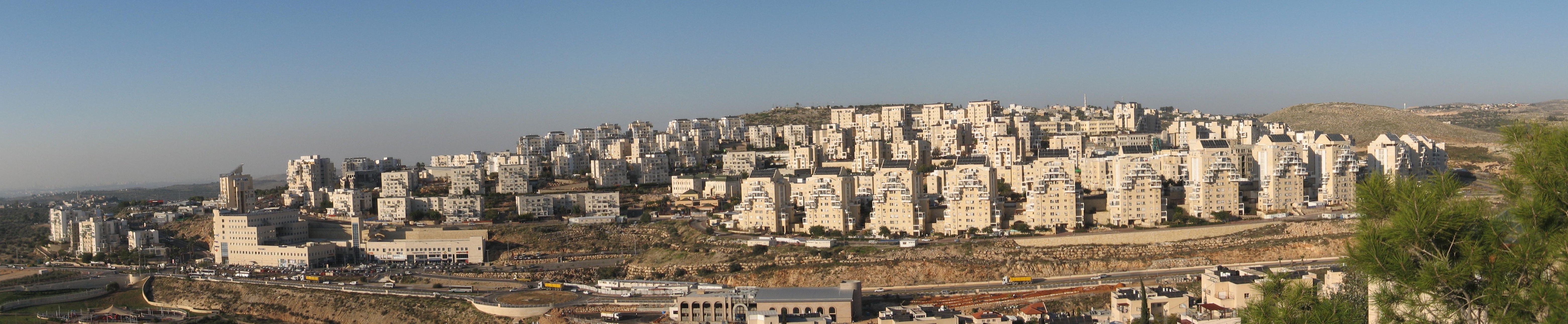 תמונה פנורמית של שכונת ברכפלד במודיעין עילית, צולם ממגדל המים שבקרית ספר